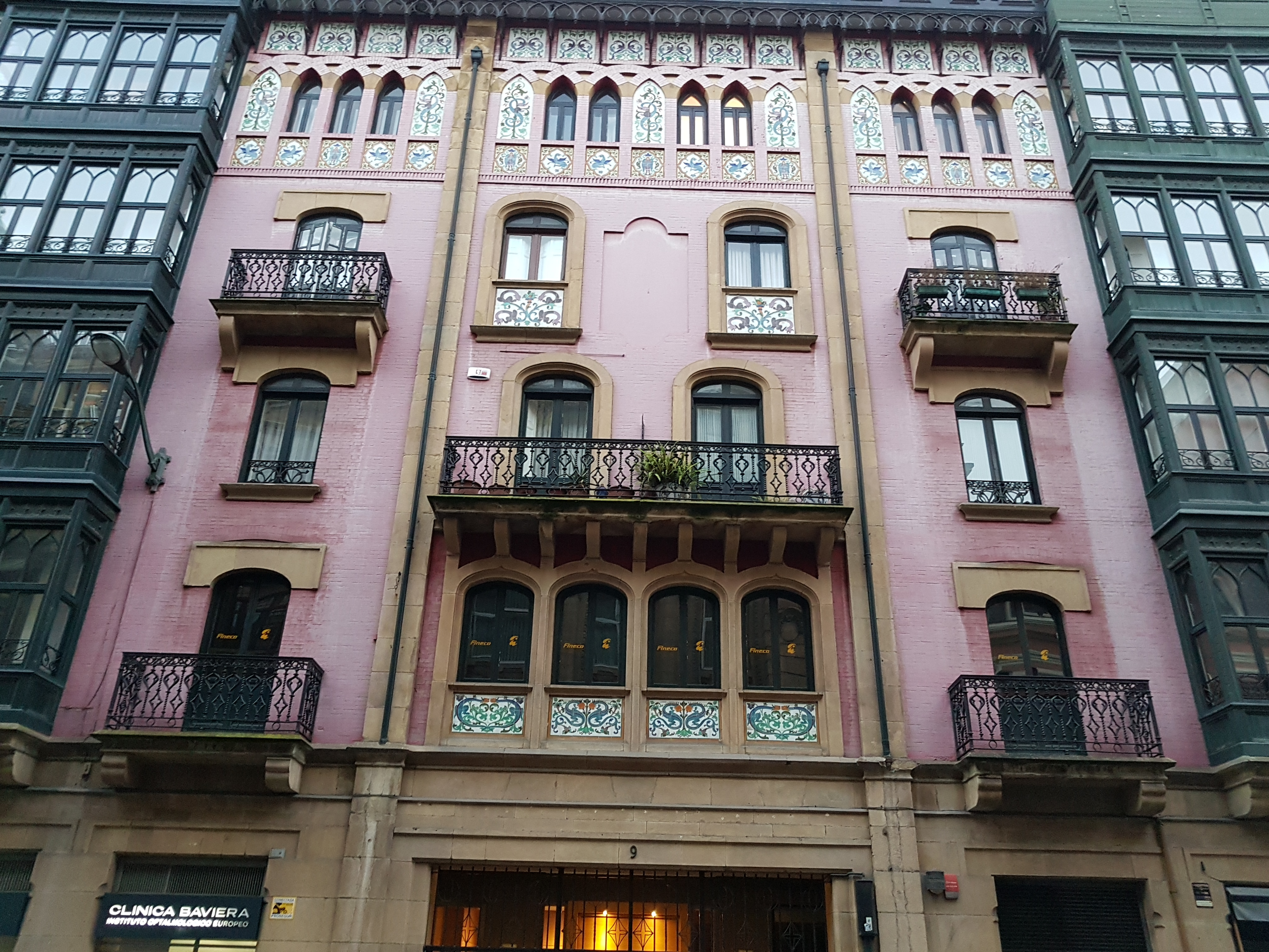 Fachada de un edificio en la calle Ibáñez de Bilbao.